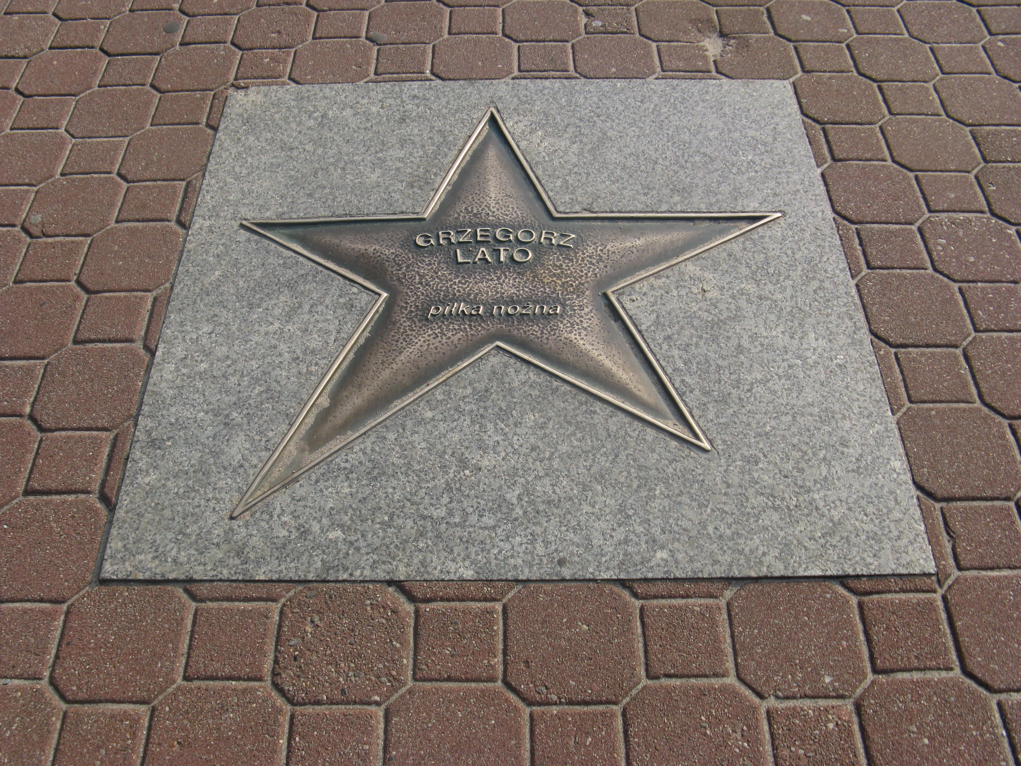 Gwiazda w Alei Gwiazd sportu we Władysławowie